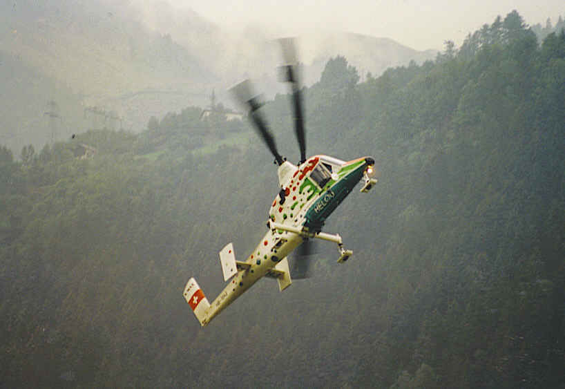 Der US-amerikanische K-Max, auf dem Ambrì Airshow in Tessin, Schweiz, am 25 August 1996 , Helog AG HB-XHJ (16.05.1995 - 04.03.1999, crashed on 4 September 1998 at Hindelang (Germany))